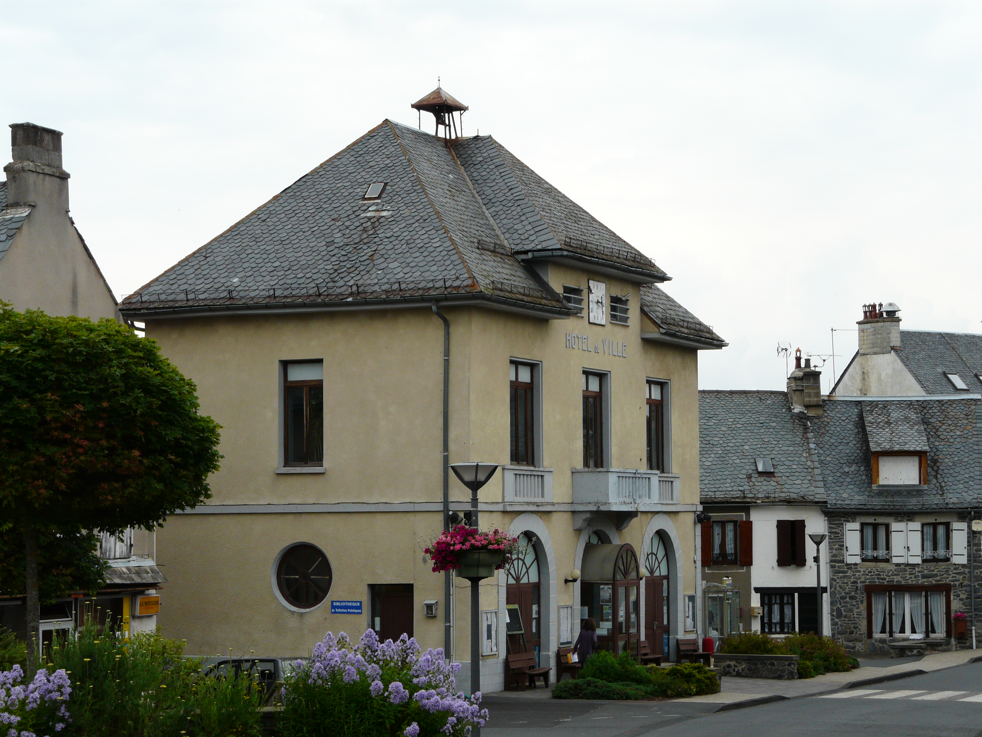 La mairie de Marcenat, Cantal, France.